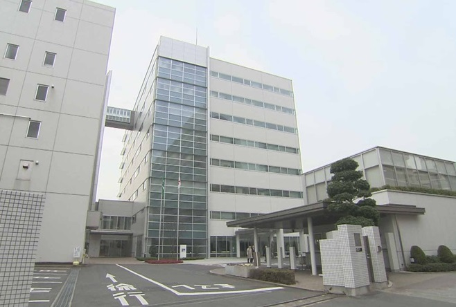 三菱電機ビルテクノサービスの本社ビル